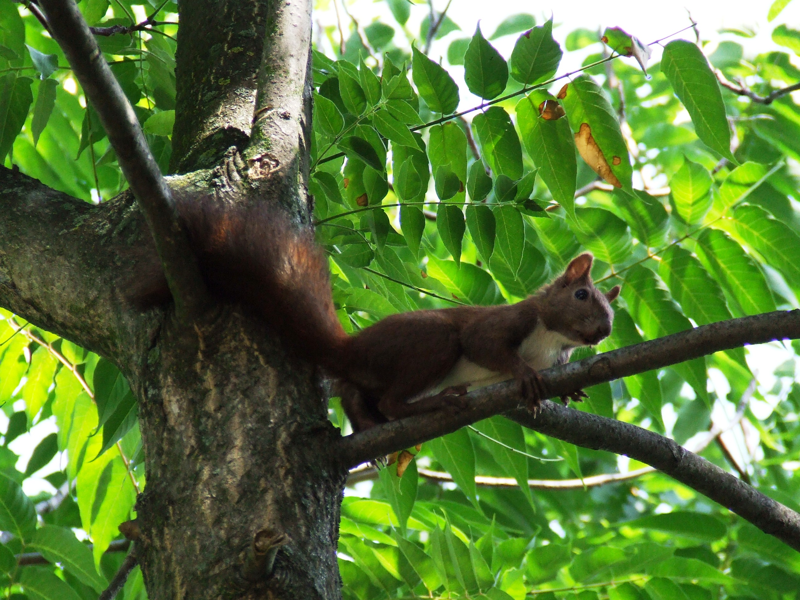 European squirel in Hungary, Zala county, Zalaegerszeg / Európai mókus Zala megye